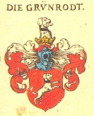 Coat of Arms, Grünrodt Family, Meissen Saxony (from: Johann Siebmacher: New Wappenbuch, scan from: Horst Appuhn, Johann Siebmachers Wappenbuch. Die bibliophilen Taschenbücher 538, 2. verb. Aufl , Dortmund 1989 Meißner, Blatt 152)